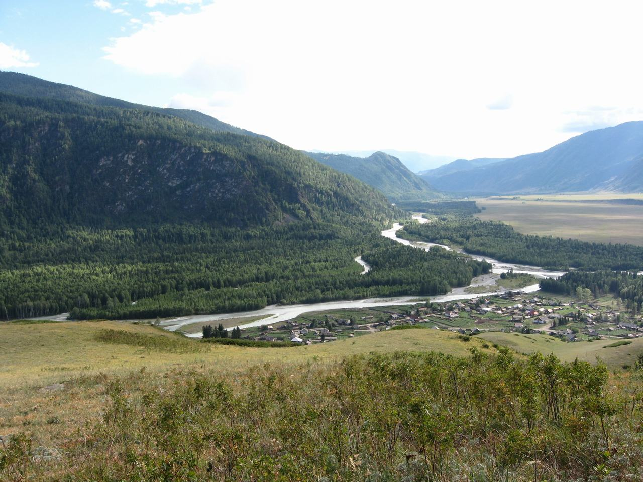 Реки Бухтарма и Берель сливаются